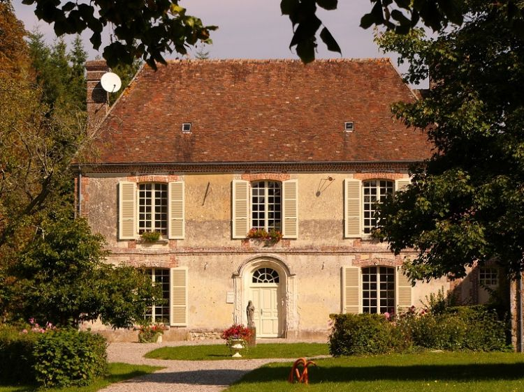 Marie de Sainte-Céronne de face